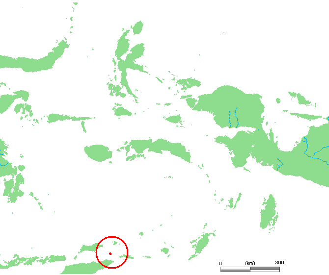 ID Kisar.PNG